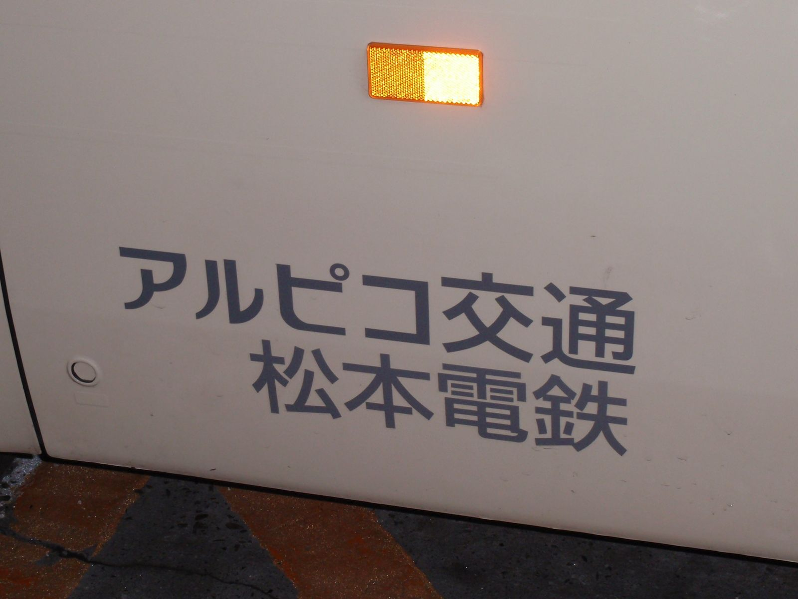 アルピコ交通のバスの社名表記の例。ブランド名として「松本電鉄」と併記している。